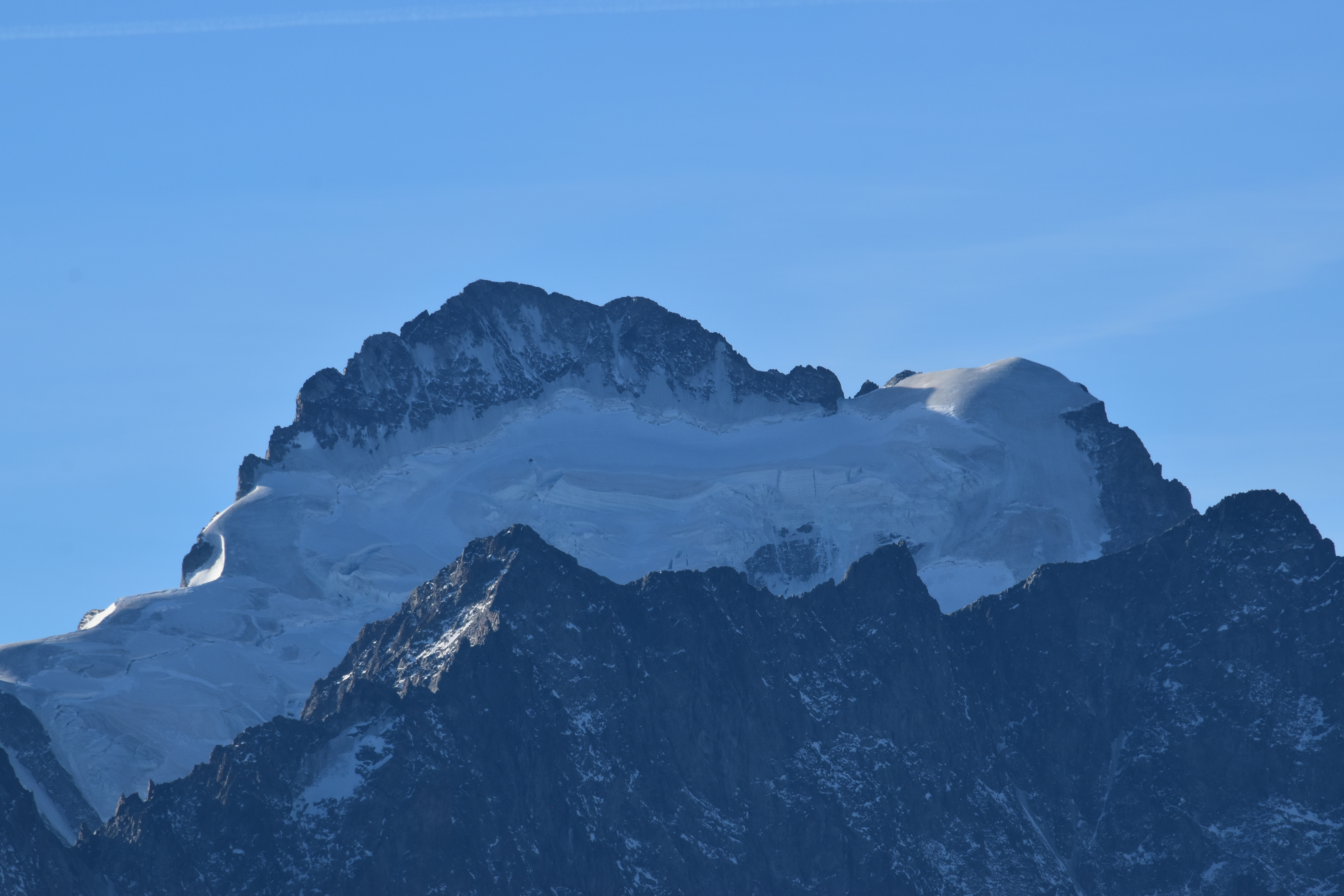 La barre des écrins vue depuis le col du Galibier.